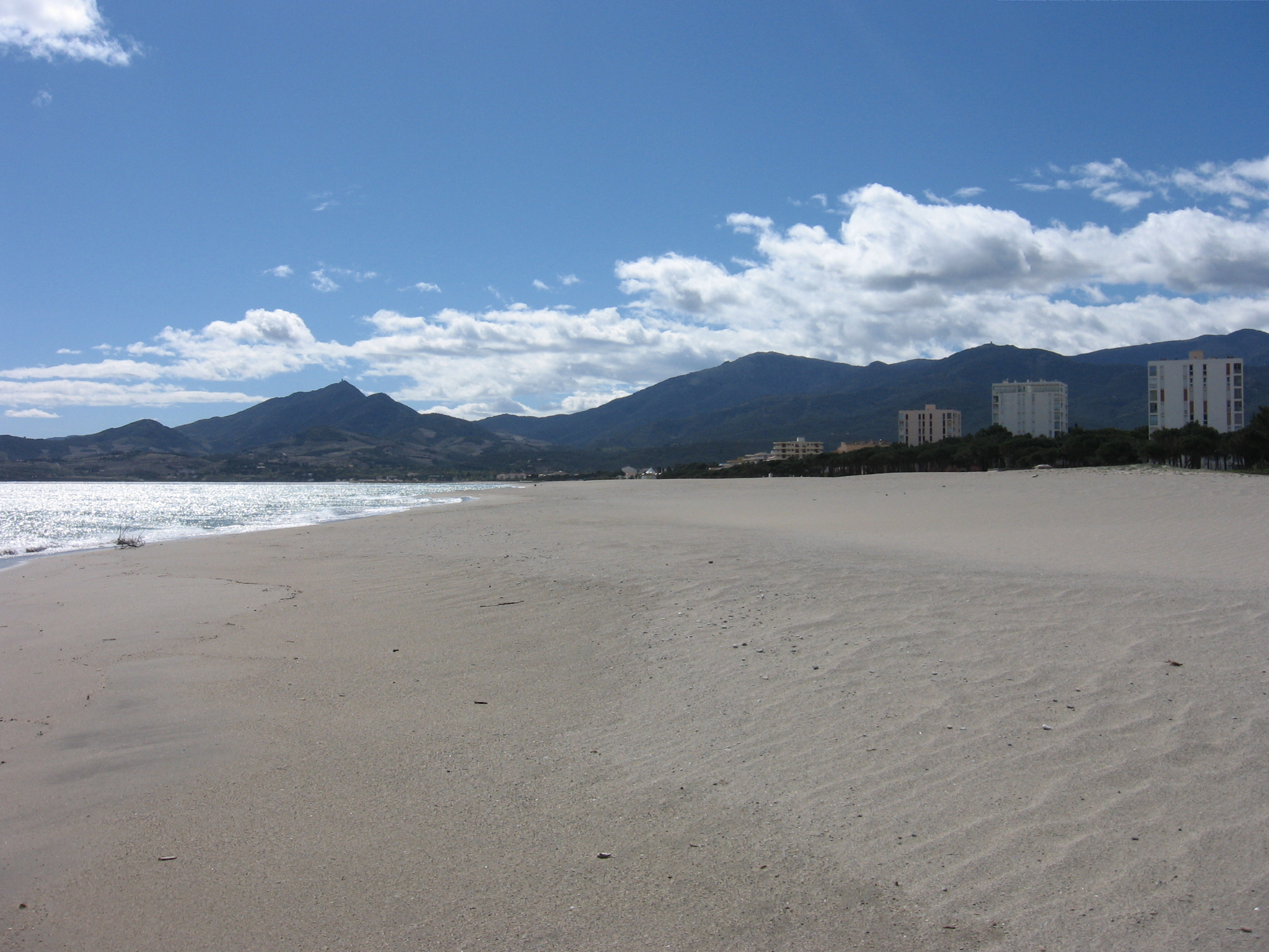 La Plage des Pins à Argelès-Plage (Argelès-sur-Mer, Pyrénées-Orientales, France).